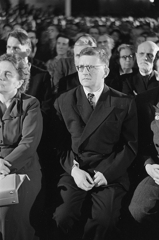 Original image description from the Deutsche Fotothek Portrait Dmitri Dmitrijewitsch Schostakowitchs im Publikum der Bachfeier